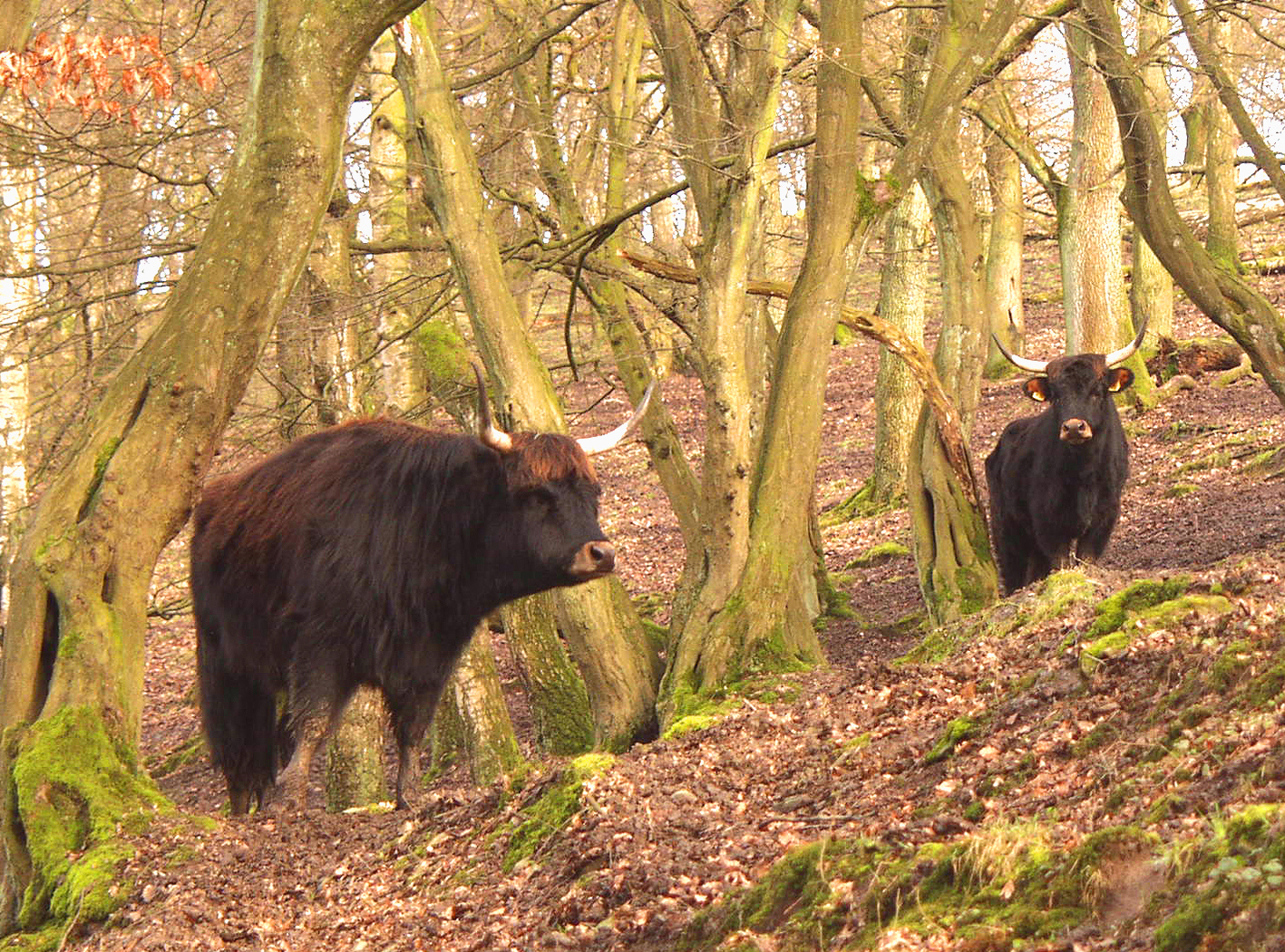 Heckrinder in Hainbuchen-Hutewald im Eiszeitlichen Wildgehege Neandertal